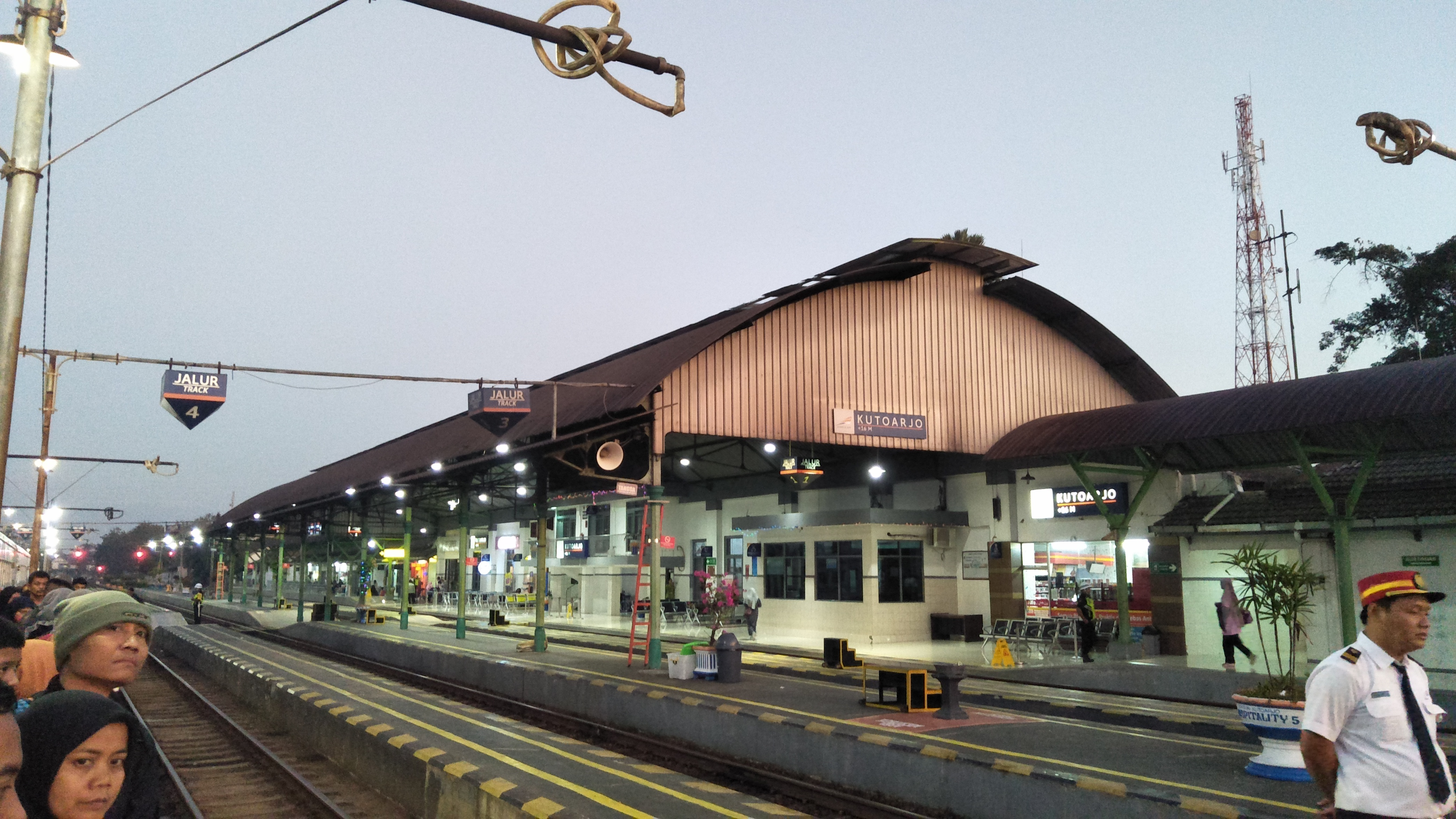 Stasiun Kutoarjo dilihat dari peron